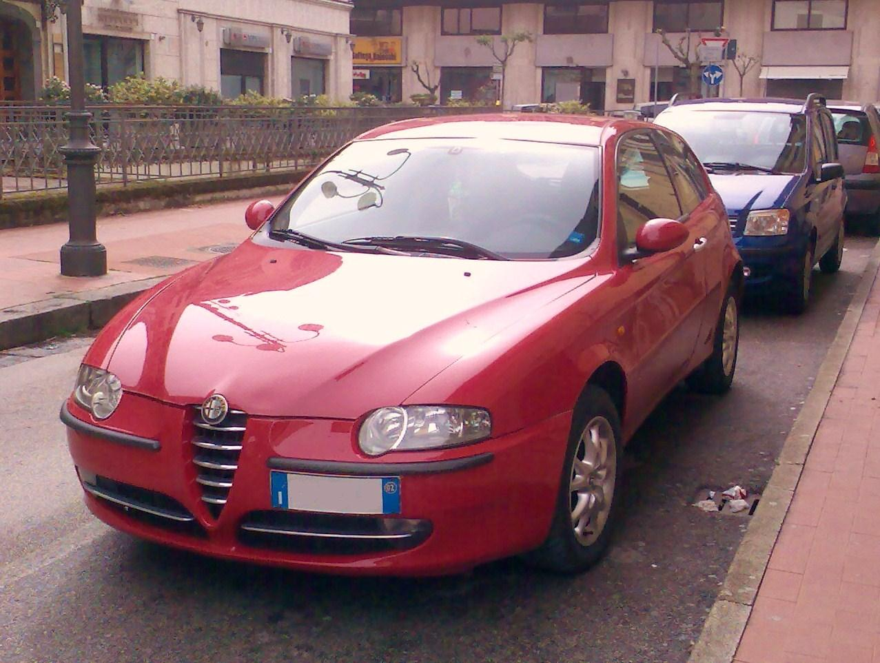 una 147 rossa frontale